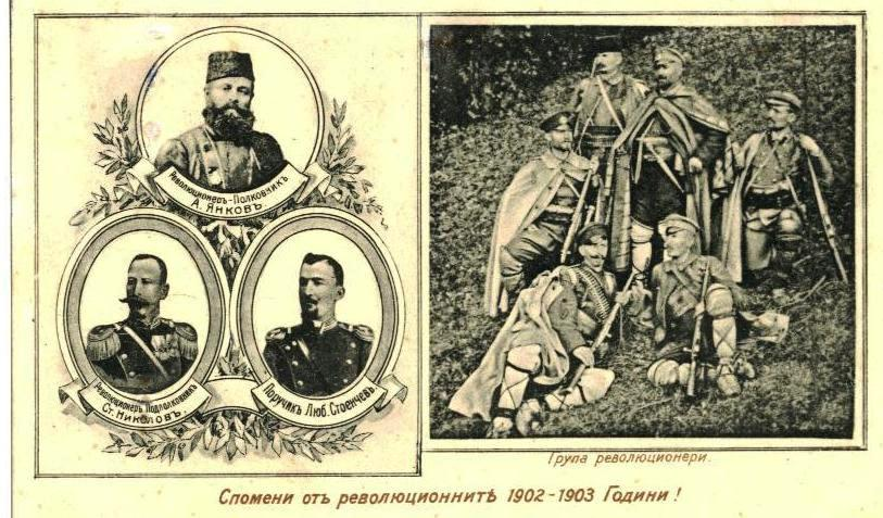 Ευχές από την Βουλγαρική ηγεσία των εξεγέρσεων 1902-1903